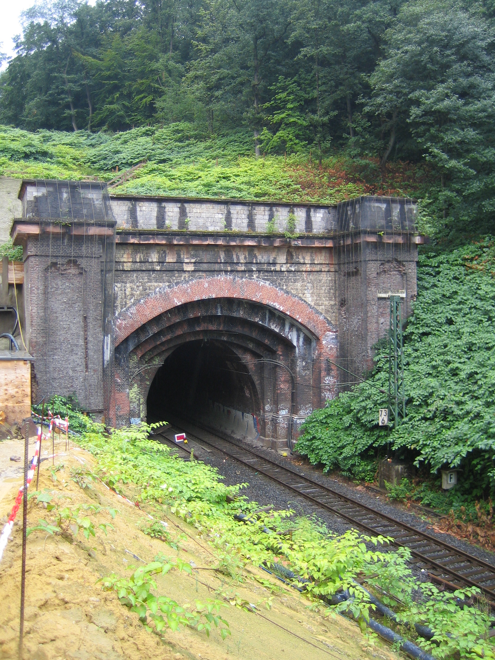 East portal of the Buschtunnel in Aachen, Germany (near the German-Belgian border) / Ostportal des Buschtunnel bei Aachen (in der Nähe der deutsch-belgischen Grenze)